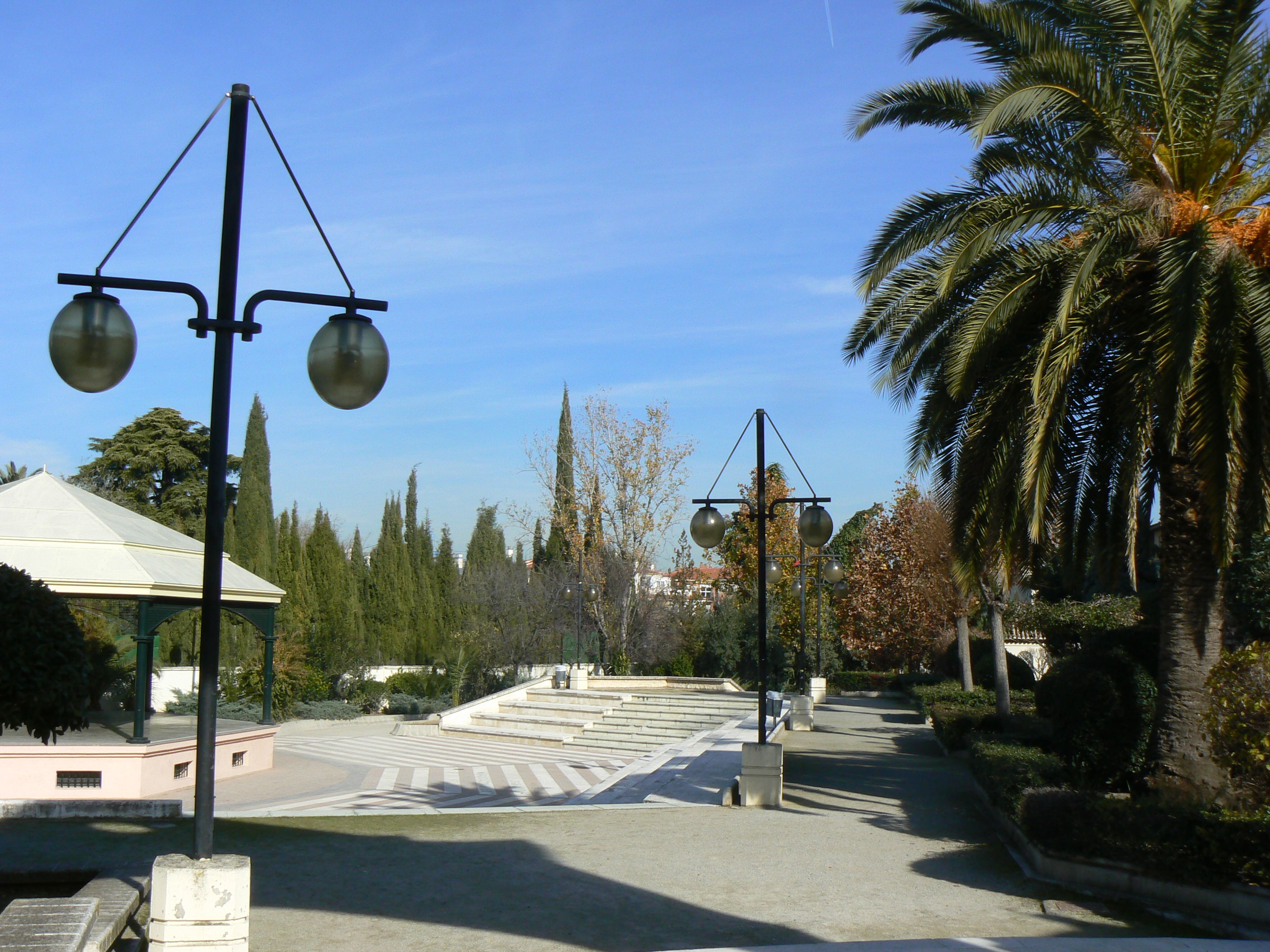 Este es otra vista del templete de La Zubia. Hay unas escaleras que bajan hasta su base pero la mayor parte del desnivel se encuentra ocupado por gradas de piedra donde la gente puede sentarse. A menudo los niños juegan a la pelota y a la bicicleta en la base del templete ya que hay una gran extensión plana y sin obstáculos propicia para el juego, sin embargo dichas actividades se encuentran prohibidas en todo el recinto del parque.